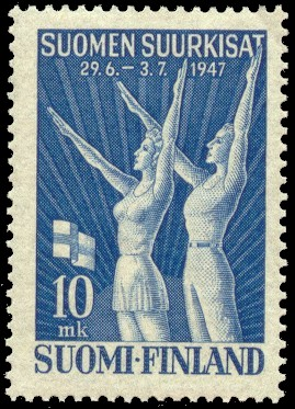 SVUL:n suurkisat 1947